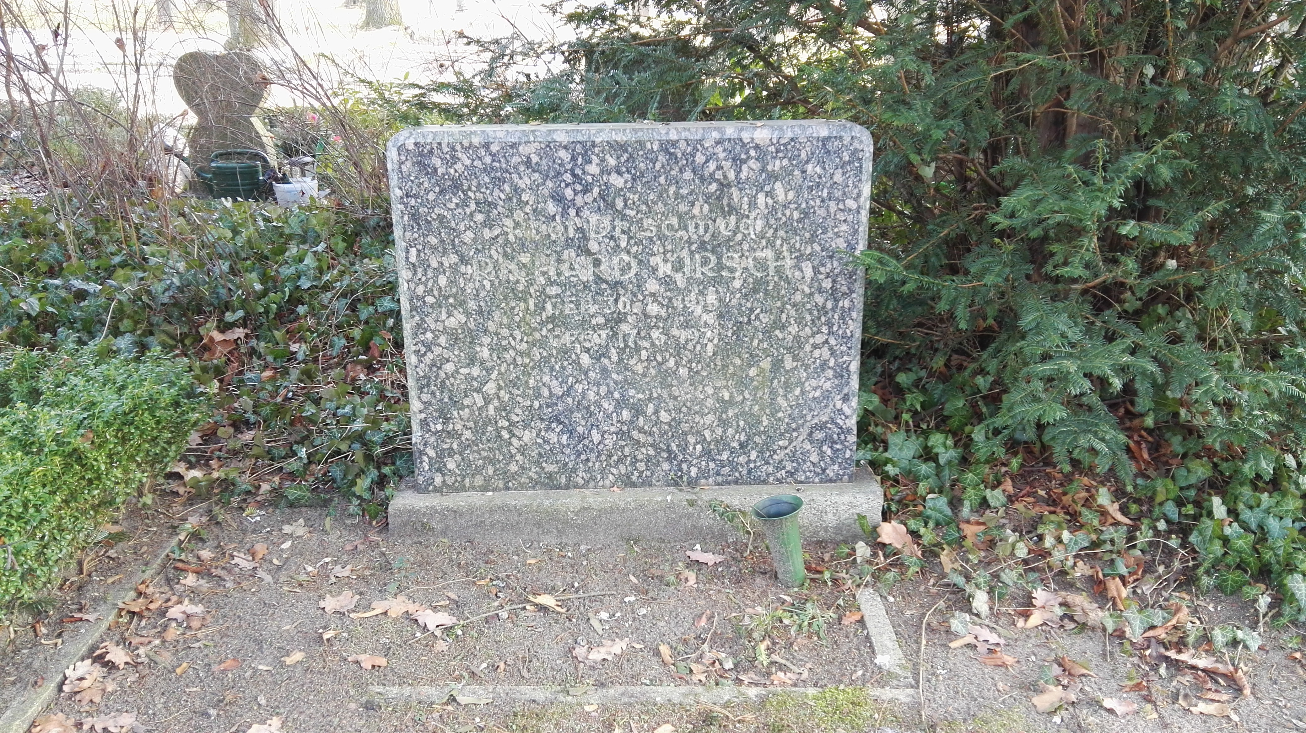 Grab von Richard Kirsch auf dem Zentralfriedhof Friedrichsfelde